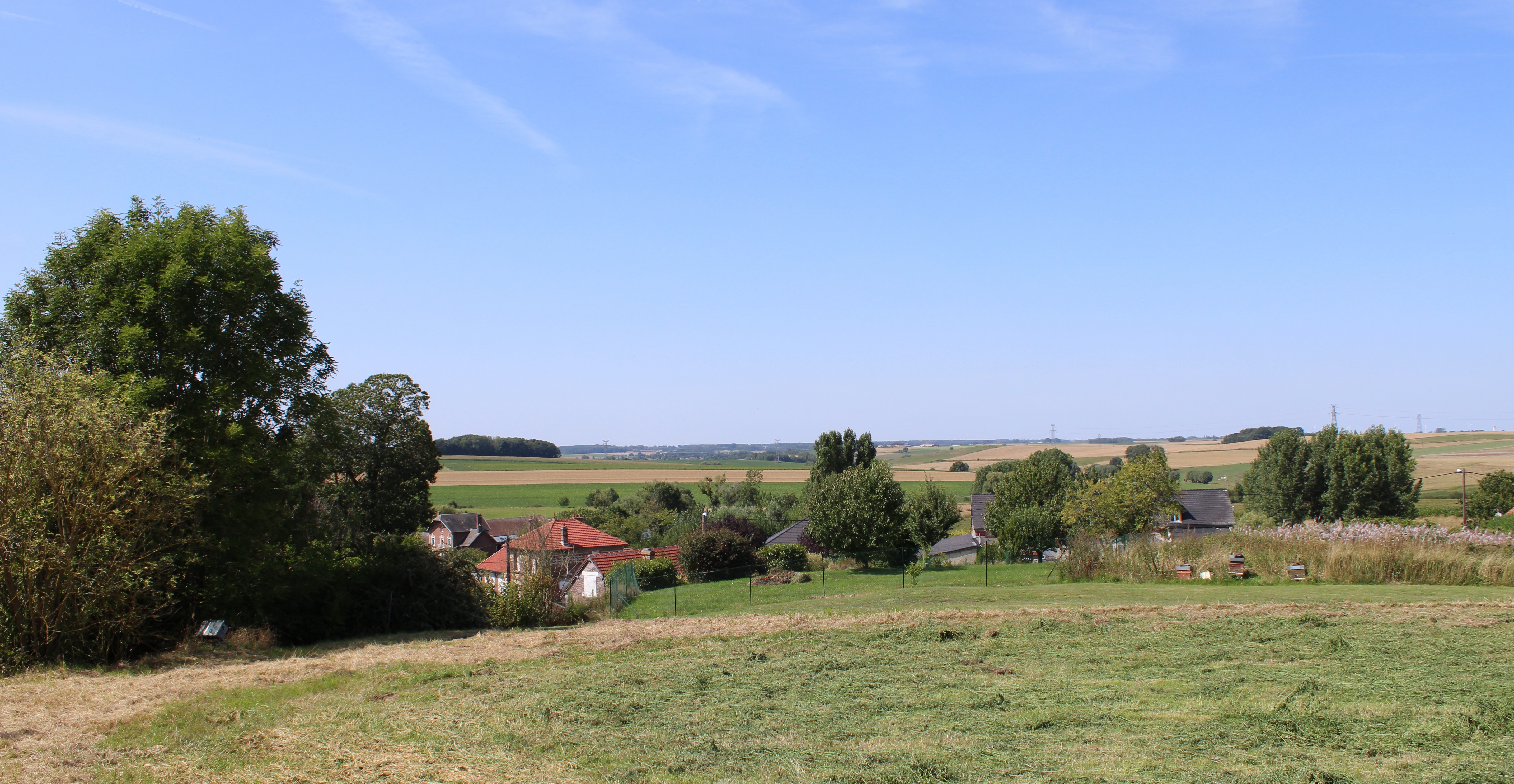 Vue du village depuis les hauteurs de l'église.